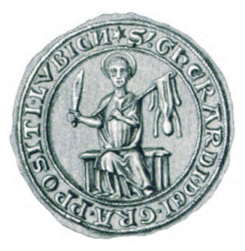 Siegel des Gerhard IV. (* um 1277; † 1323), Graf von Holstein-Plön. Das Siegel stammt aus der Zeit um 1302-1304.